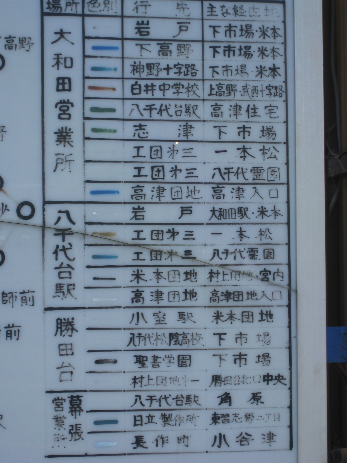 東洋バスの昔の路線図の路線案内。